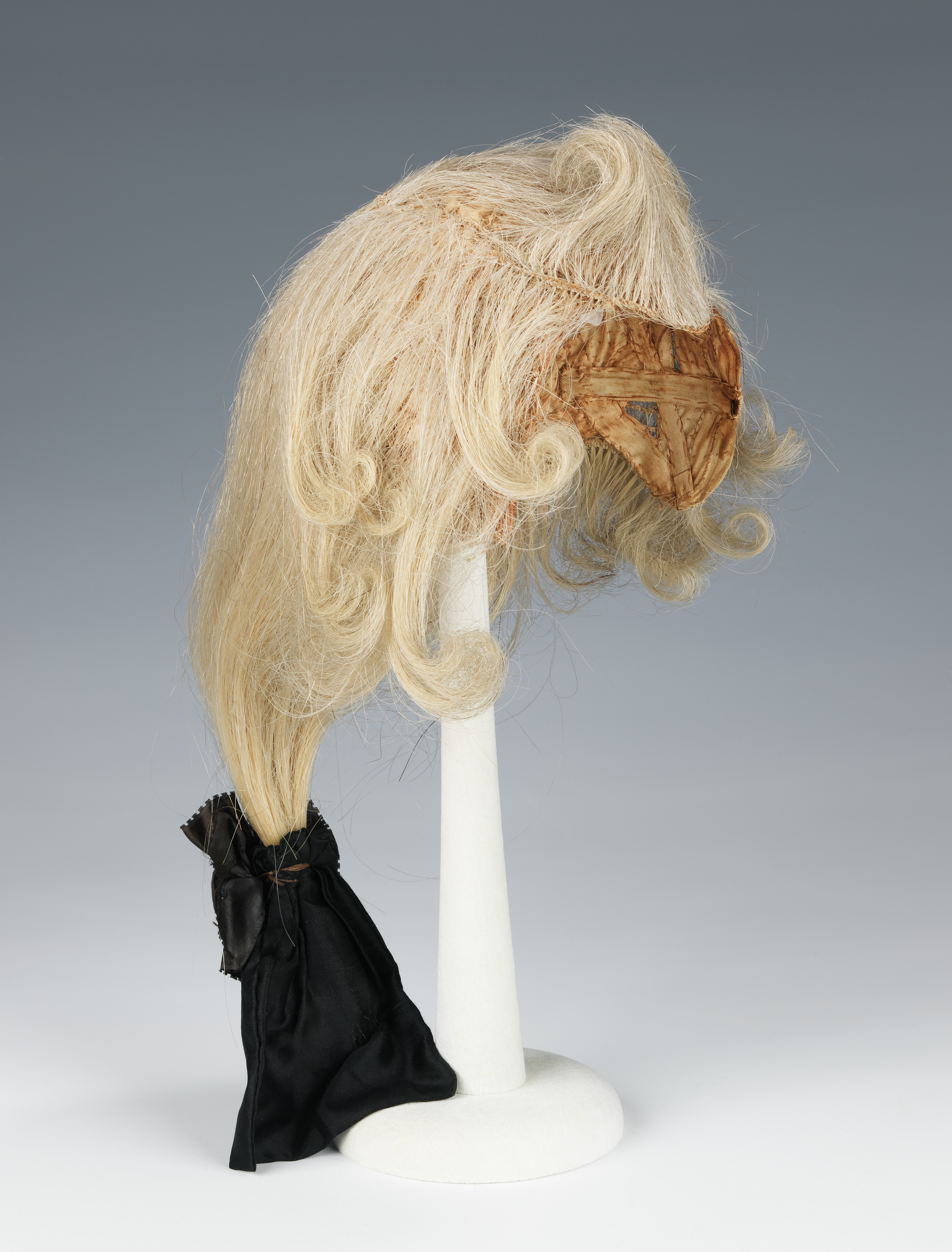 French; Wig